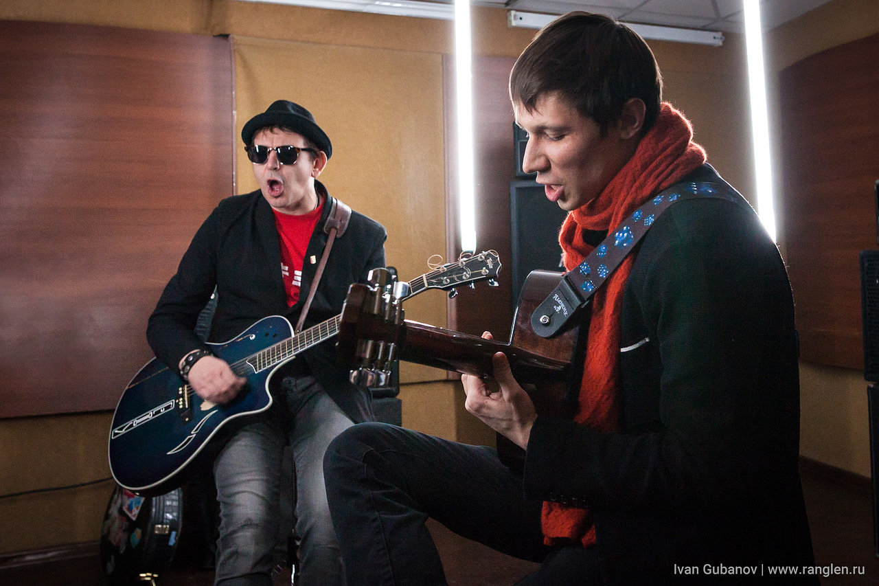 Сергей Гарифуллин записывает трек новой песни Эстелада совместно с Иваном Демьяном (Группа 7Б).